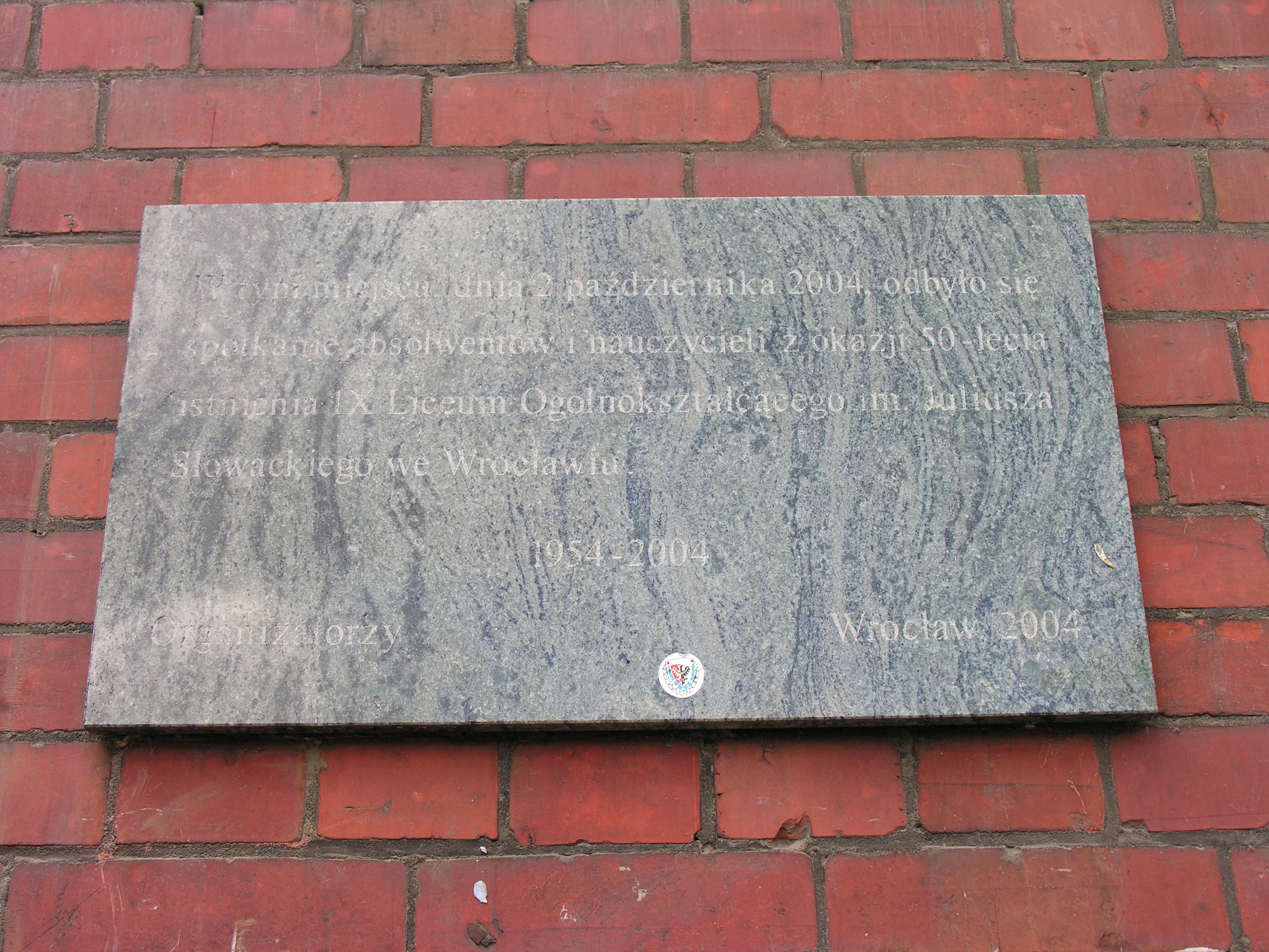 Tablica upamiętniająca 50-lecie IX LO im. Juliusza Słowackiego umieszczona na budynku szkoły od strony podwórza.